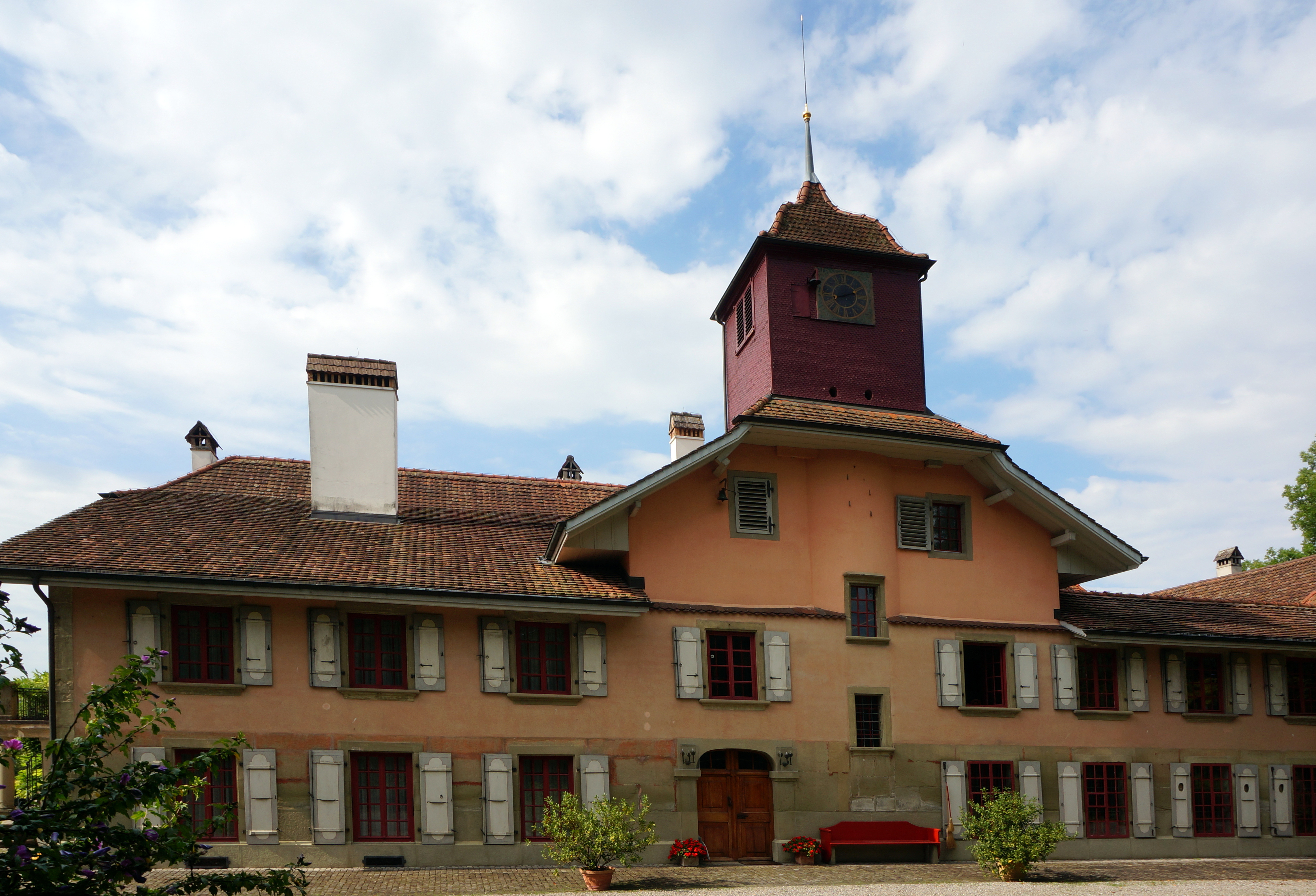 Landsitz Rothus, Ostansicht